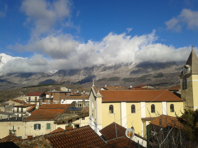 Panoramica di Castelnuovo